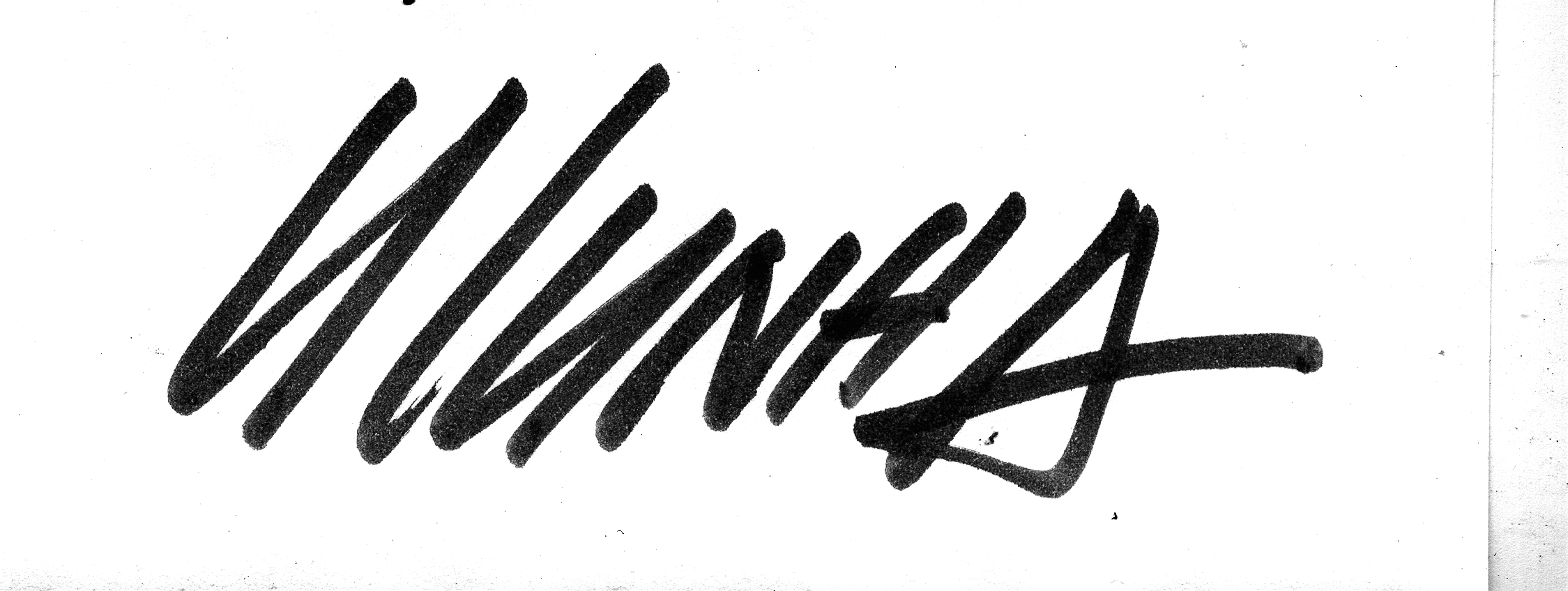 Assinatura do pintor Hélio Cunha